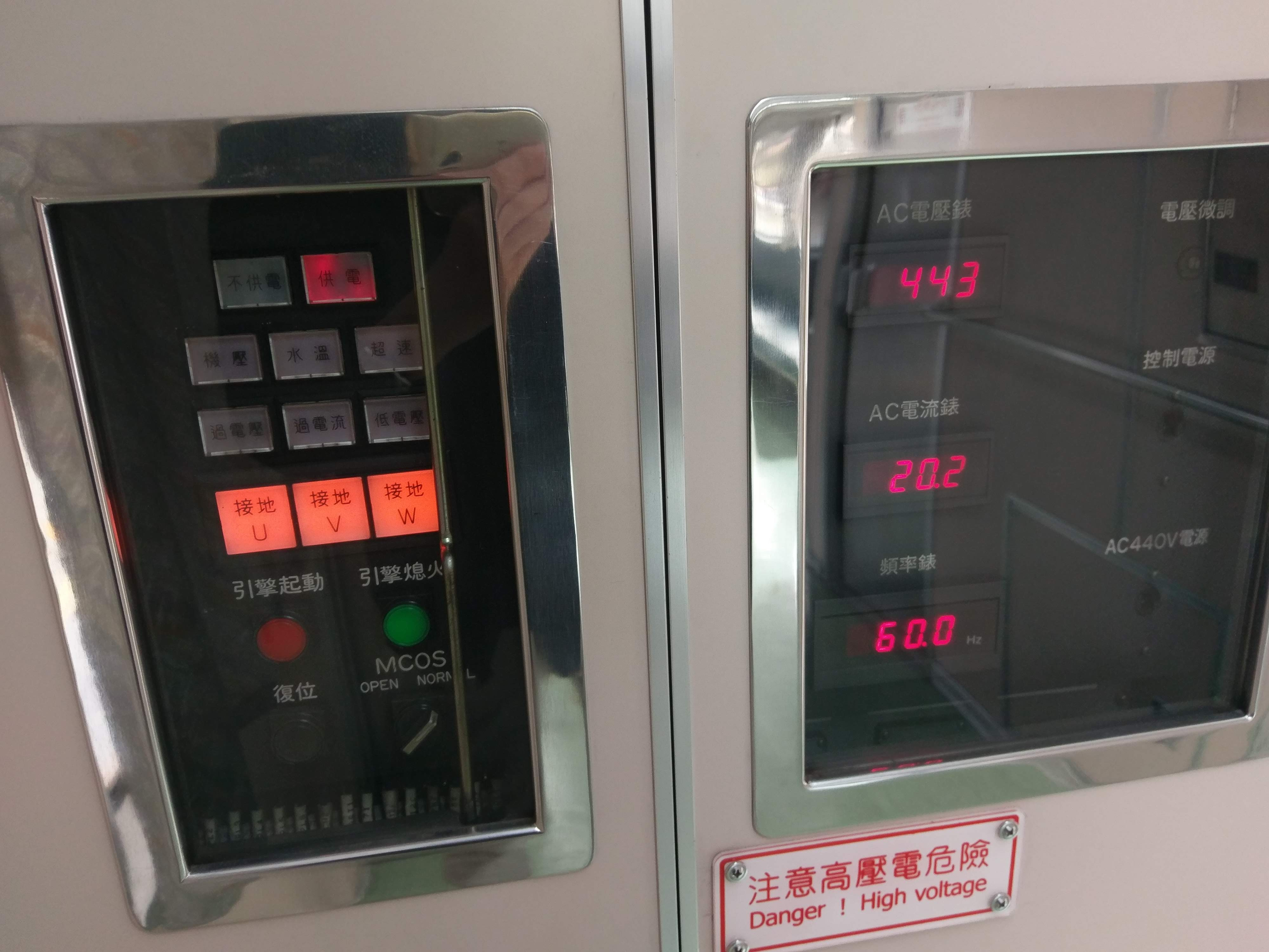 中文（台灣）: 臺灣鐵路管理局DR1000型柴油客車主配電盤。